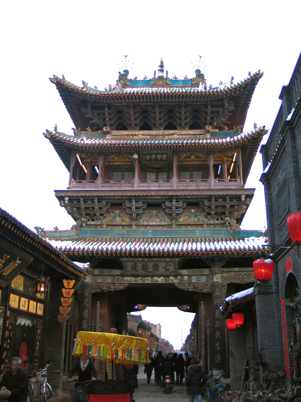 Pingyao : Tour du marché / Pingyao : Market Tower